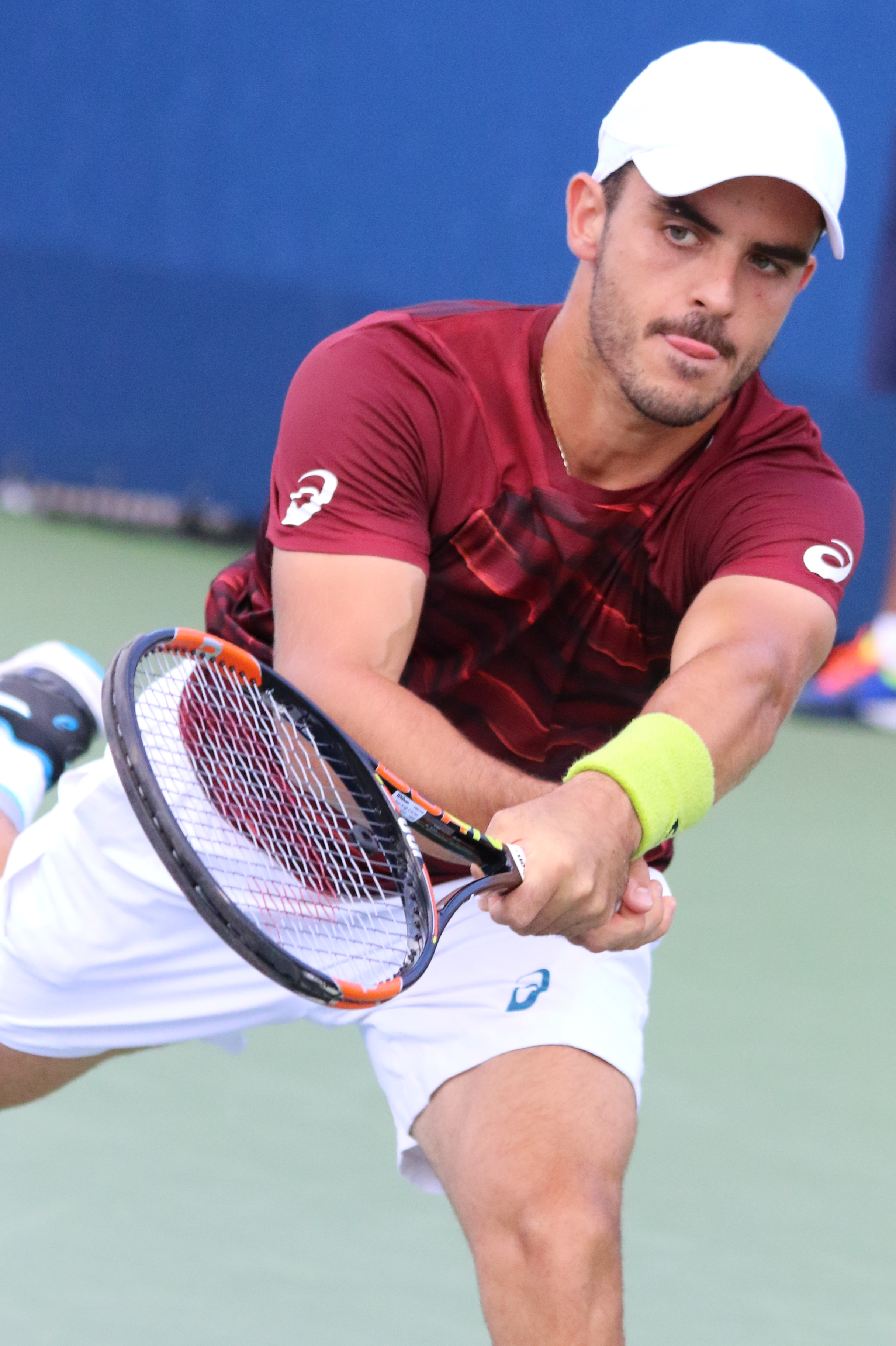 Fabbiano US16 (7)